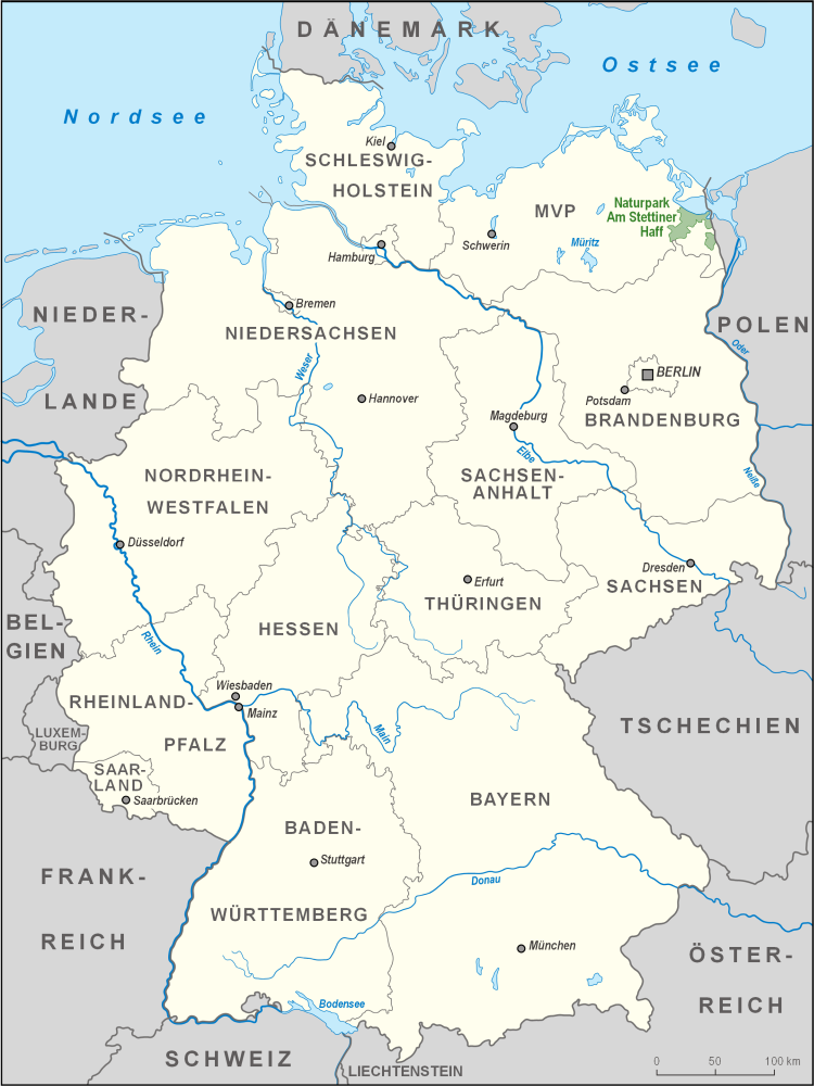 Karte des Naturparks Am Stettiner Haff in Deutschland